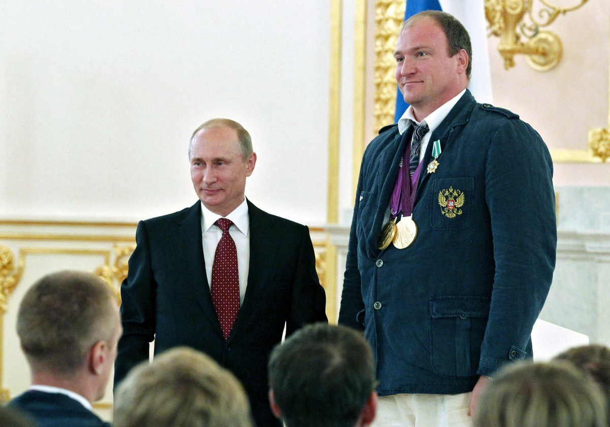 Алексей Ашапатов